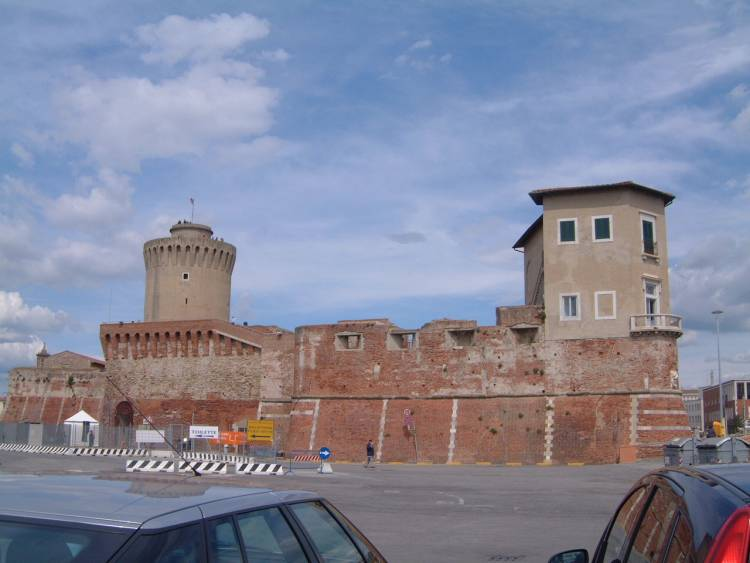 Je suis l'auteur de cette photo prise en juin 2006